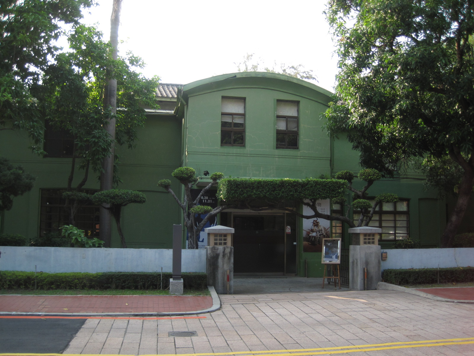 中山大學蔣公行館